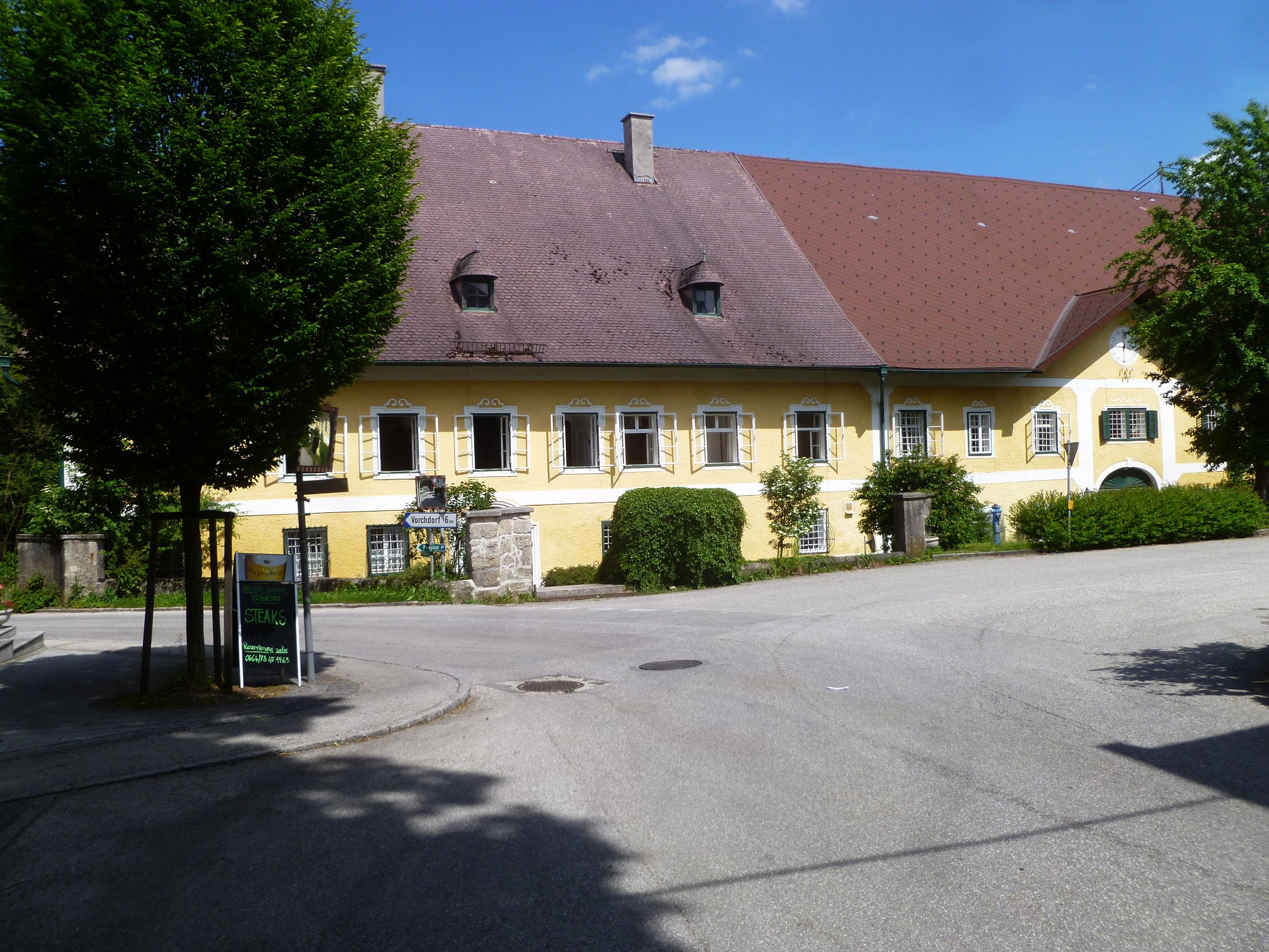 Schloss Lindach (Laakirchen) - Schlossfront